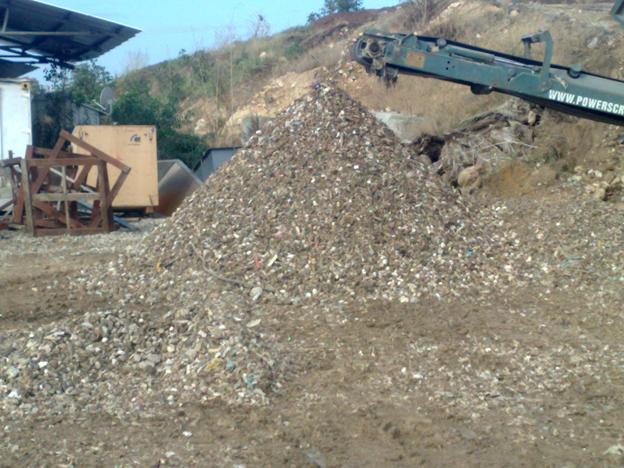 חומר ממוחזר באתר הטמנה "ברקת" של חברת "בני וצביקה בע"מ".